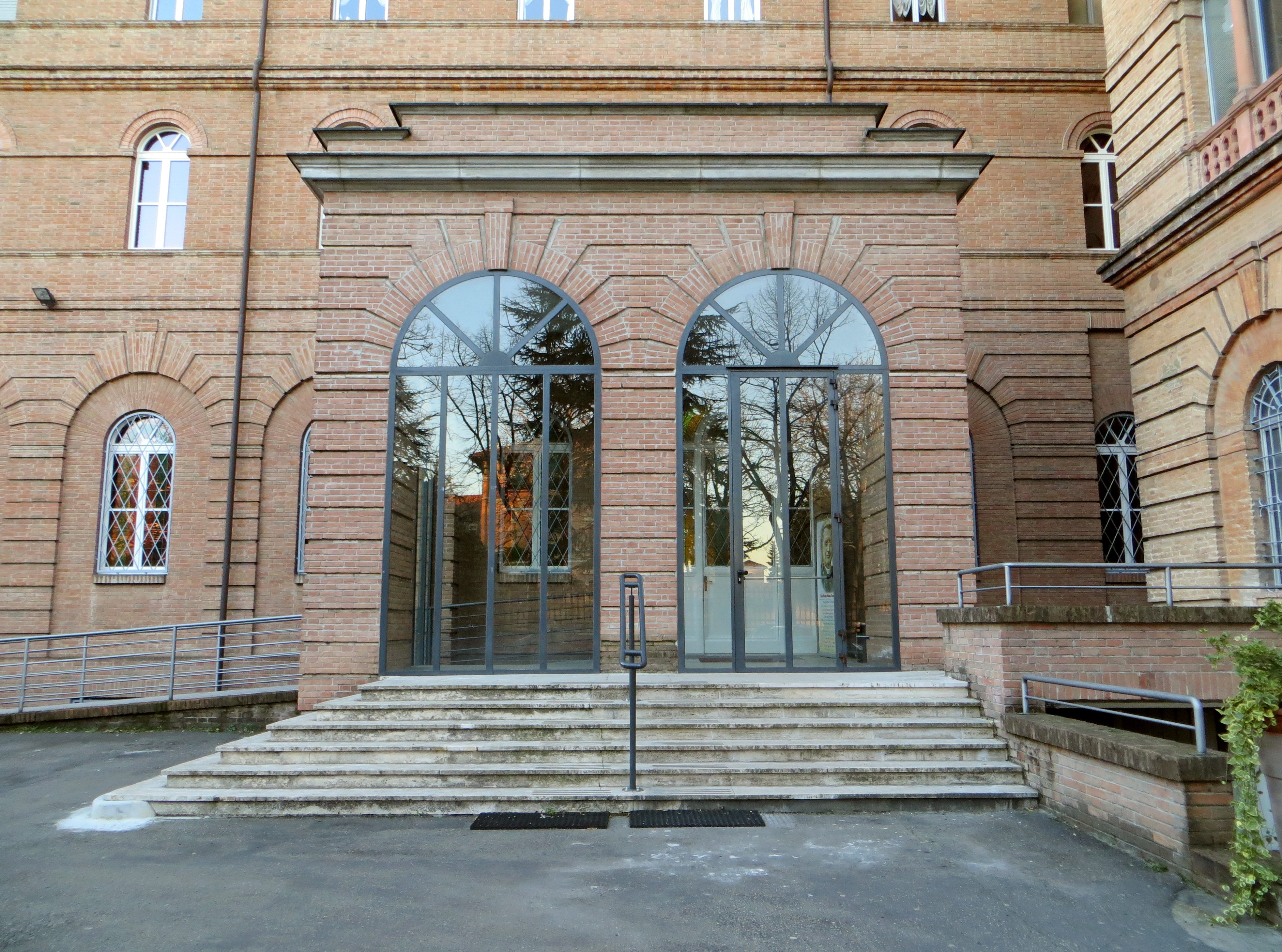 Casa madre dei Missionari Saveriani (Parma) - ingresso al santuario Guido Maria Conforti